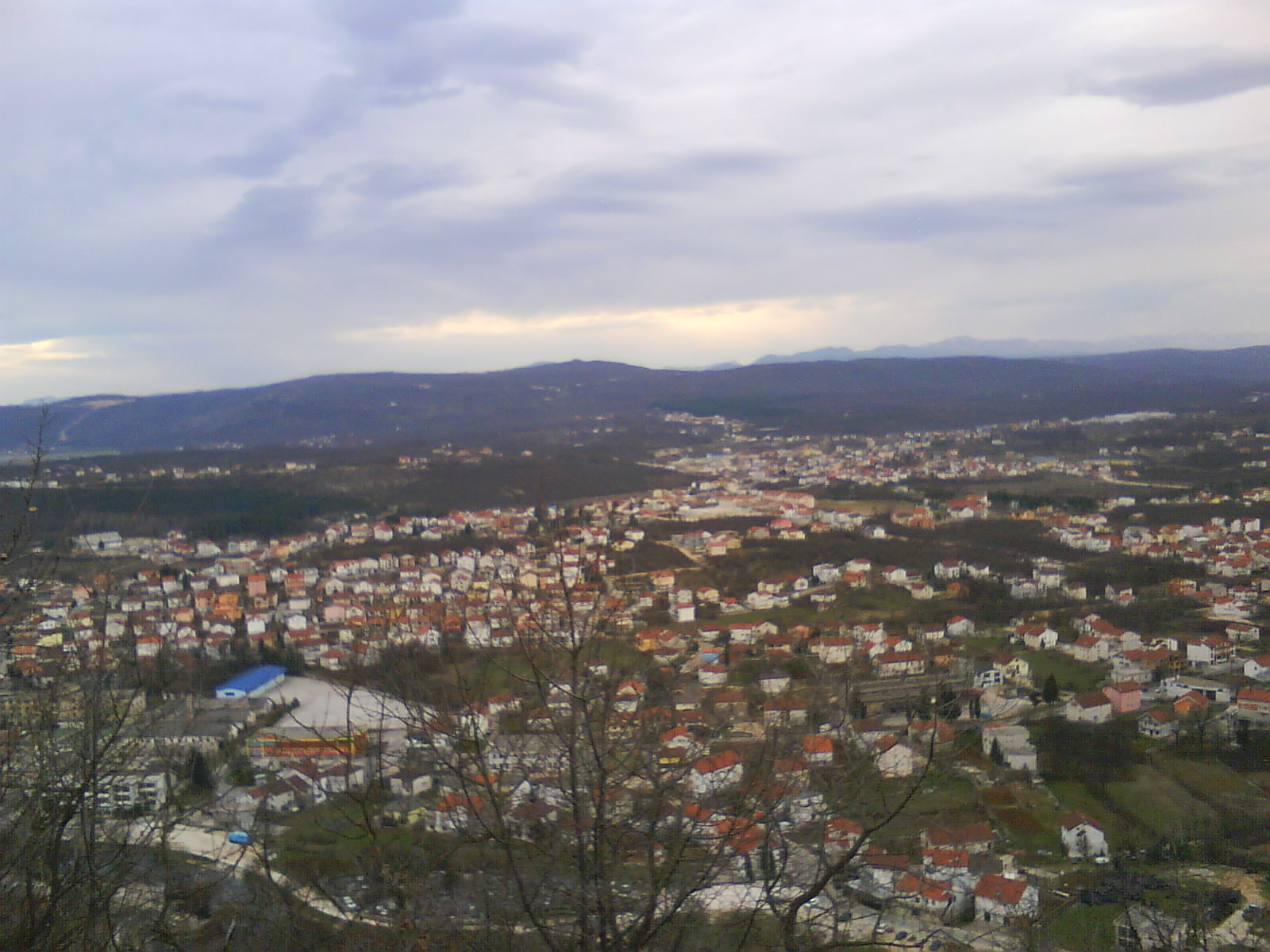 Široki Brig